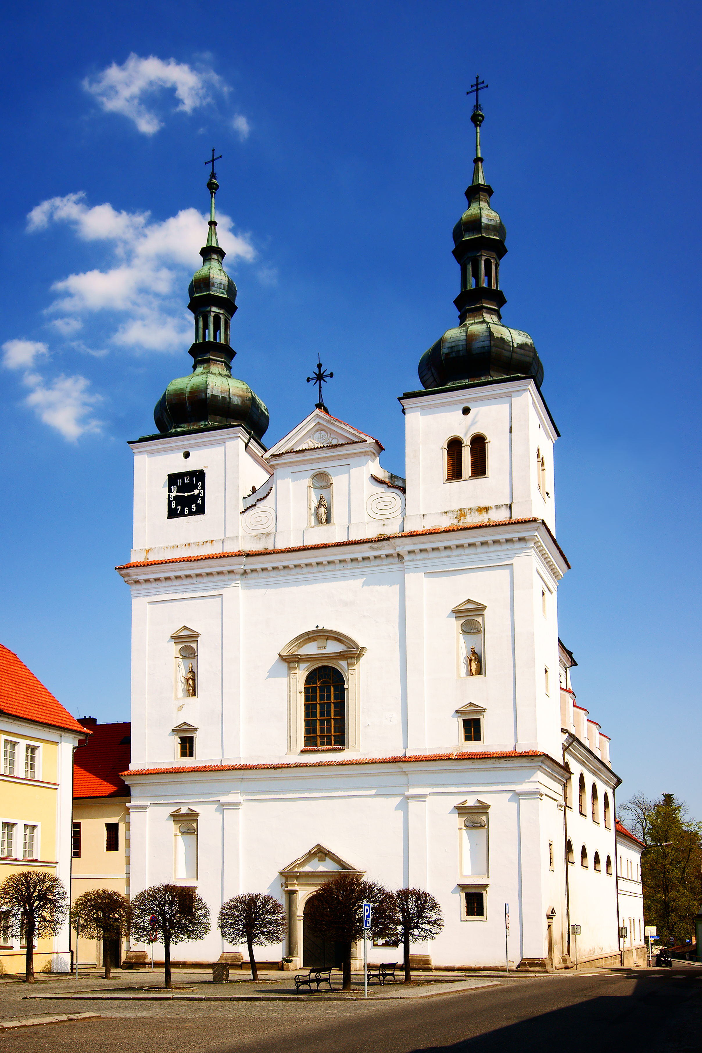 Barokní kostel svatého Františka Xaverského a Ignáce z Loyoly na náměstí v Březnici. Autorem stavby je italský architekt Carlo Lurago.